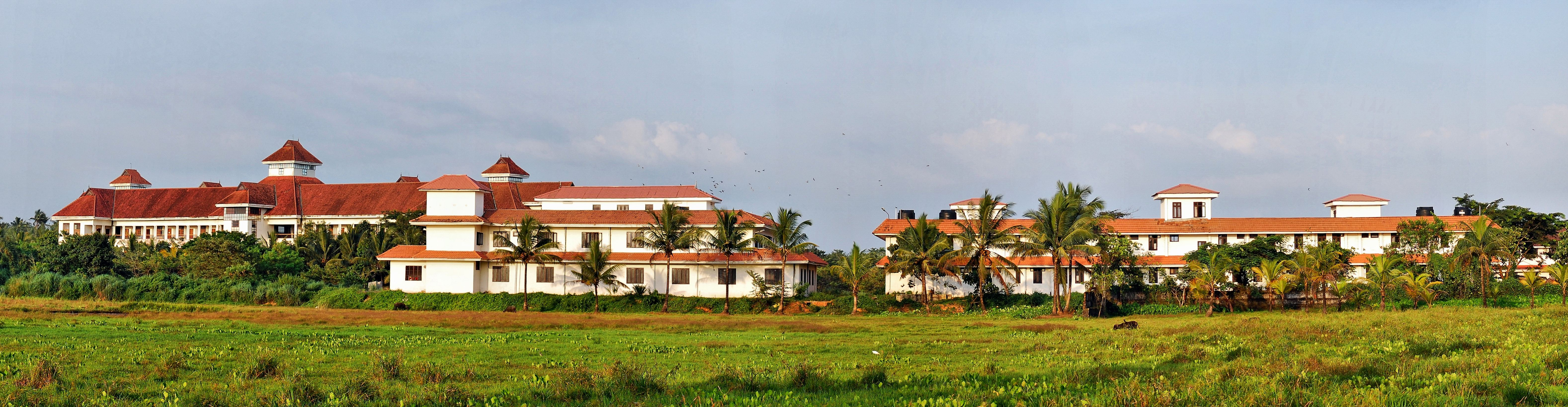 കാലടിയിലെ സംസ്കൃത സർവകലാശാല